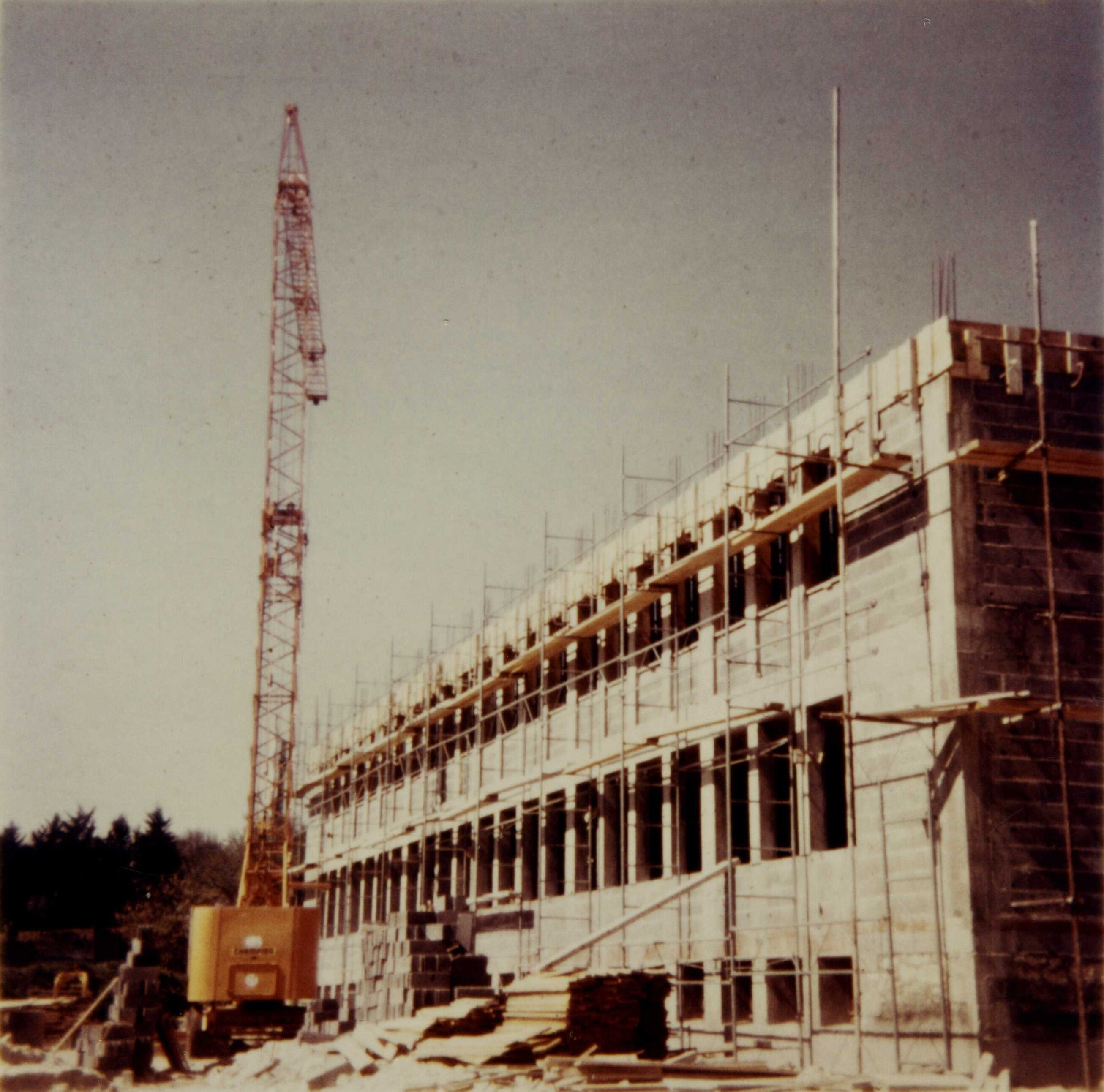 Construction du siège social de la Caisse locale du Crédit Mutuel, 29 boulevard Joffre à La Rochelle (France). 1969.